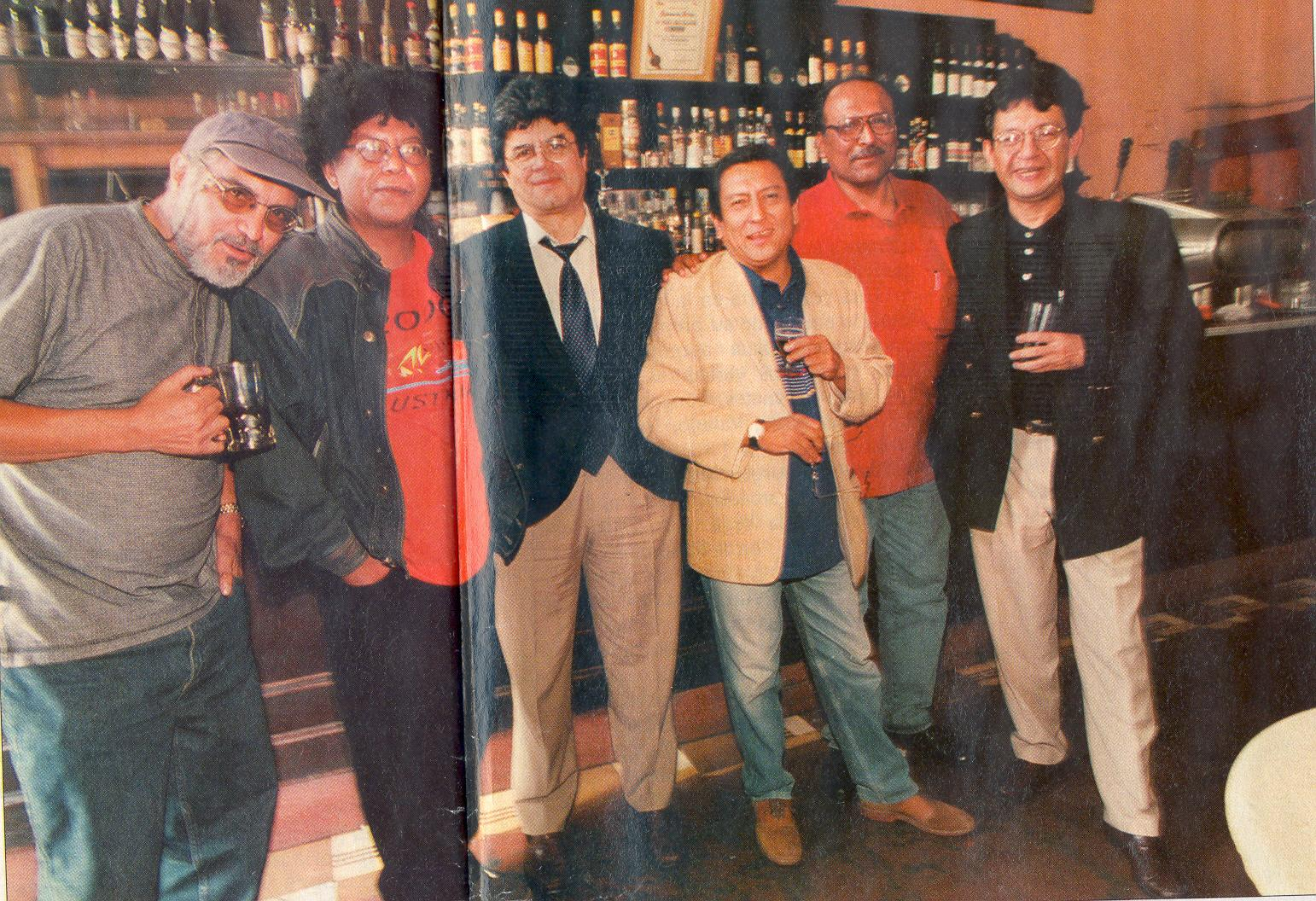 HZ en el Cordano